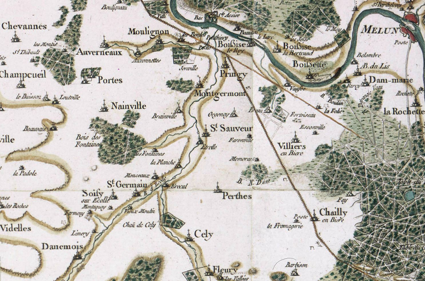 Carte de la région de Perthes (77) au XVIIIe siècle par Cassini; Perthes, Seine-et-Marne, France.